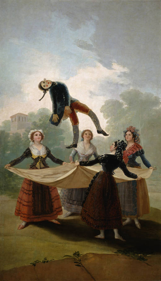 Serie Cartones para tapices.